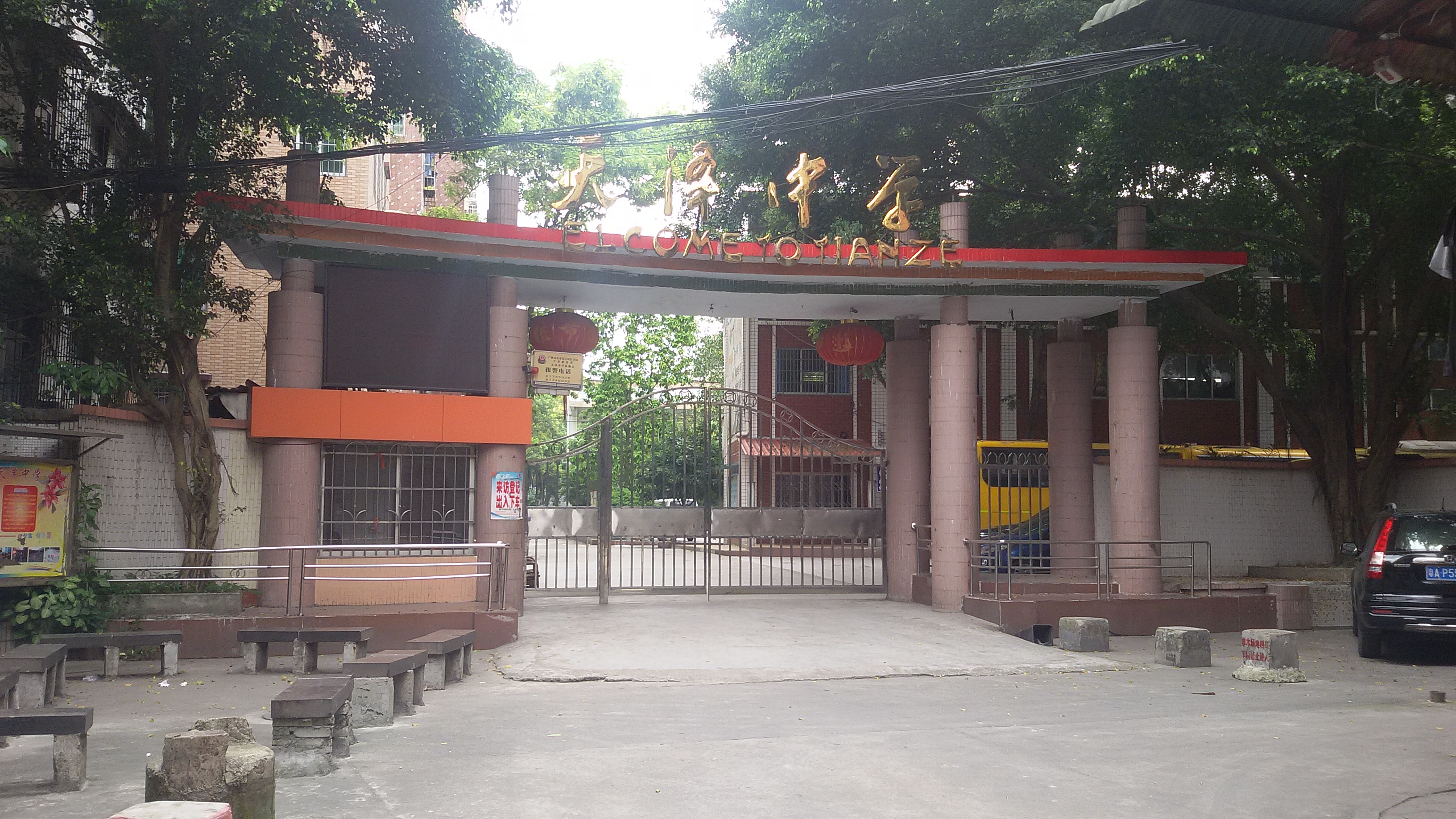 粵語: 廣州市天澤中學正門